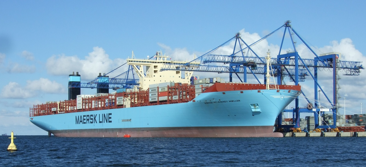 Mærsk Mc-Kinney Møller, Terminal DCT Gdańsk, Port Północny